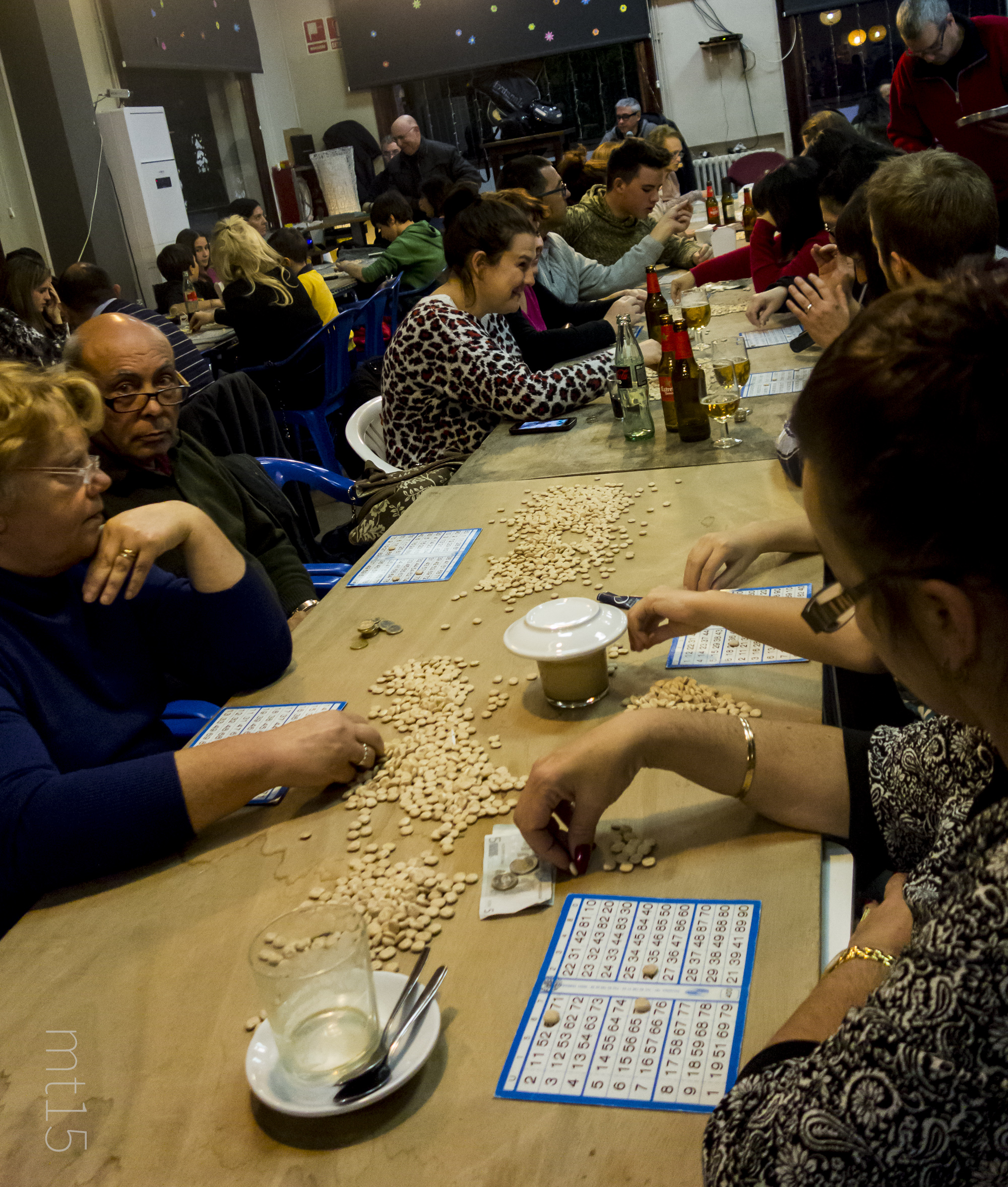 Jugadors de Quintu, Sitges